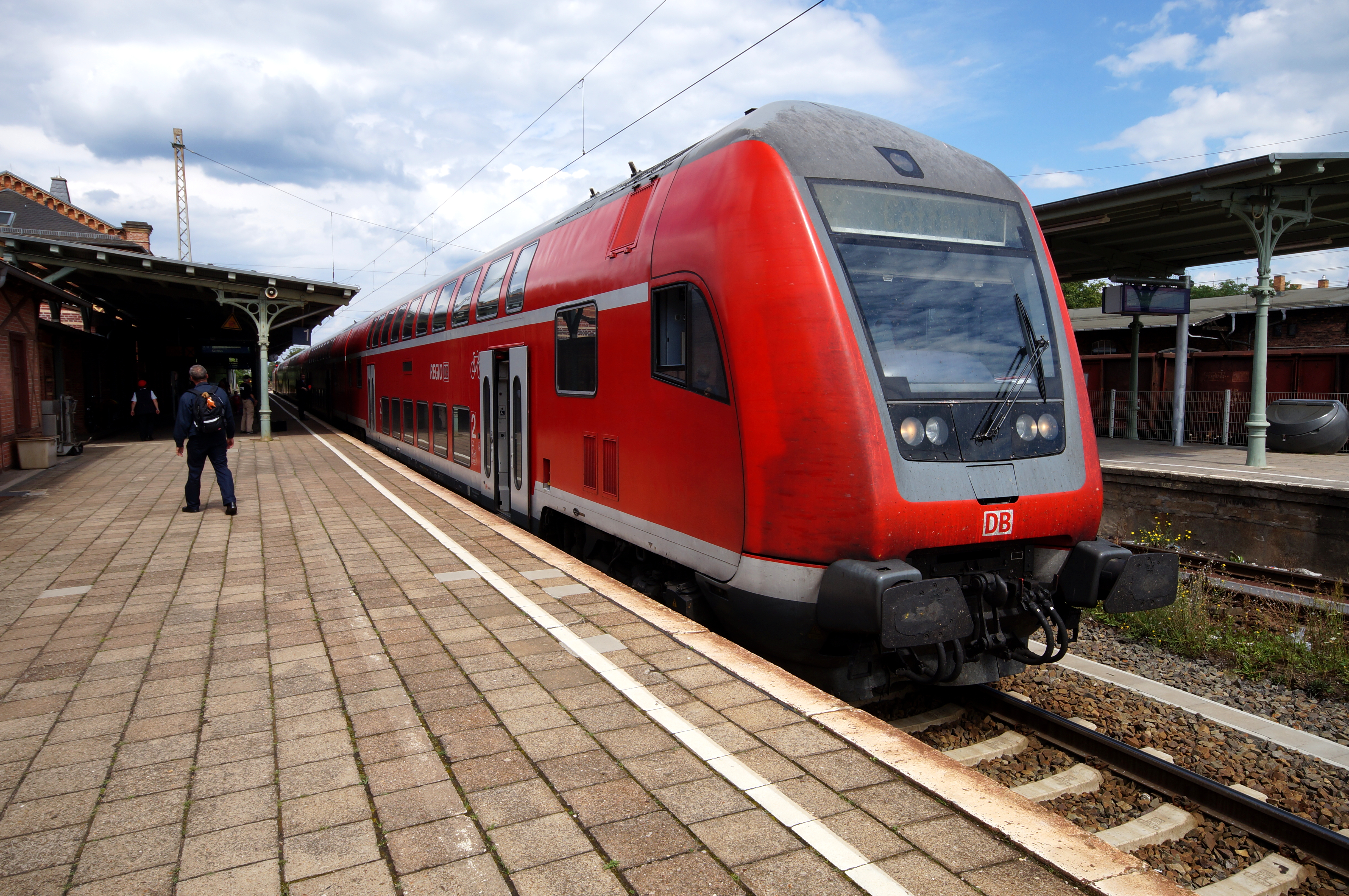 Ein Doppelstockwagen der Deutschen Bahn im Bahnhof Königs Wusterhausen auf dem Weg nach Cottbus